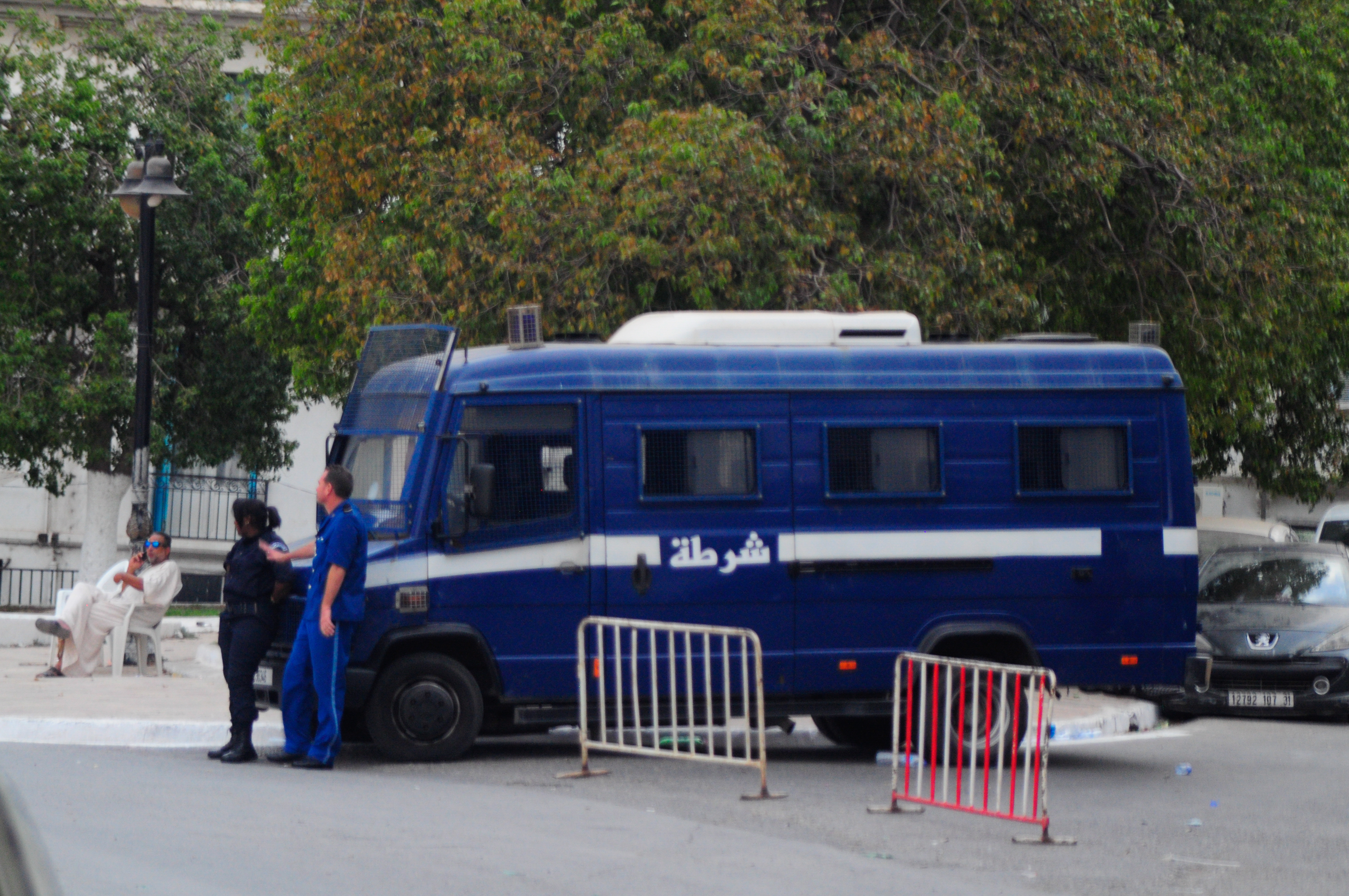 police algérienne a fond de mer a oran